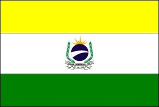 De acordo com a Lei brasileira em Propriedade Industrial (Lei 9.279 de 14 de maio de 1996), Capítulo IV, Artigo 191, os símbolos oficiais brasileiros são de domínio público porque eles podem ser copiados e reproduzidos sem qualquer permissão do governo brasileiro ou qualquer outro órgão, a menos que eles estejam sendo copiados ou reproduzidos com intenções sujas.